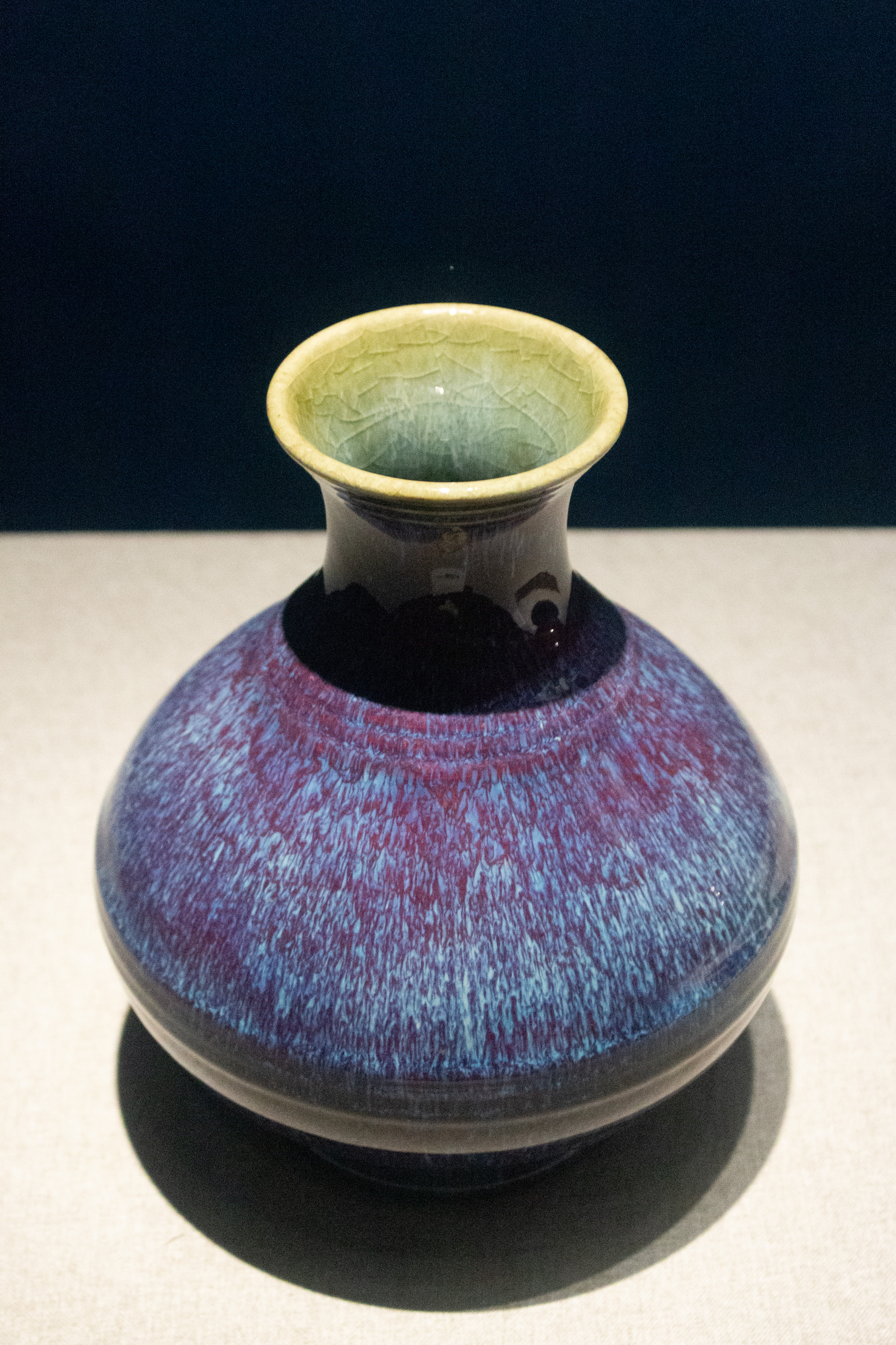 雍正款窑变釉弦纹撇口瓶，摄于上海奉贤博物馆“雍正故宫文物大展”